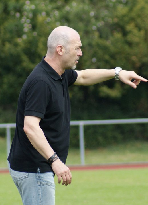 Rainer Kraft 2011 als Trainer vom VfL Kirchheim